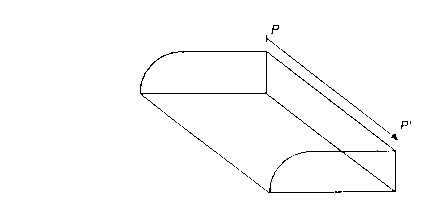 Seriaalne meetod. Geomeetrilise kujundi translatsioon, muusikalise mõiste "transponeerimine võrdtempereeritud süsteemis" vaste matemaatikas. Translatsiooni korral toimub algse kujundi P paralleelne siirdumine kujundiks P'